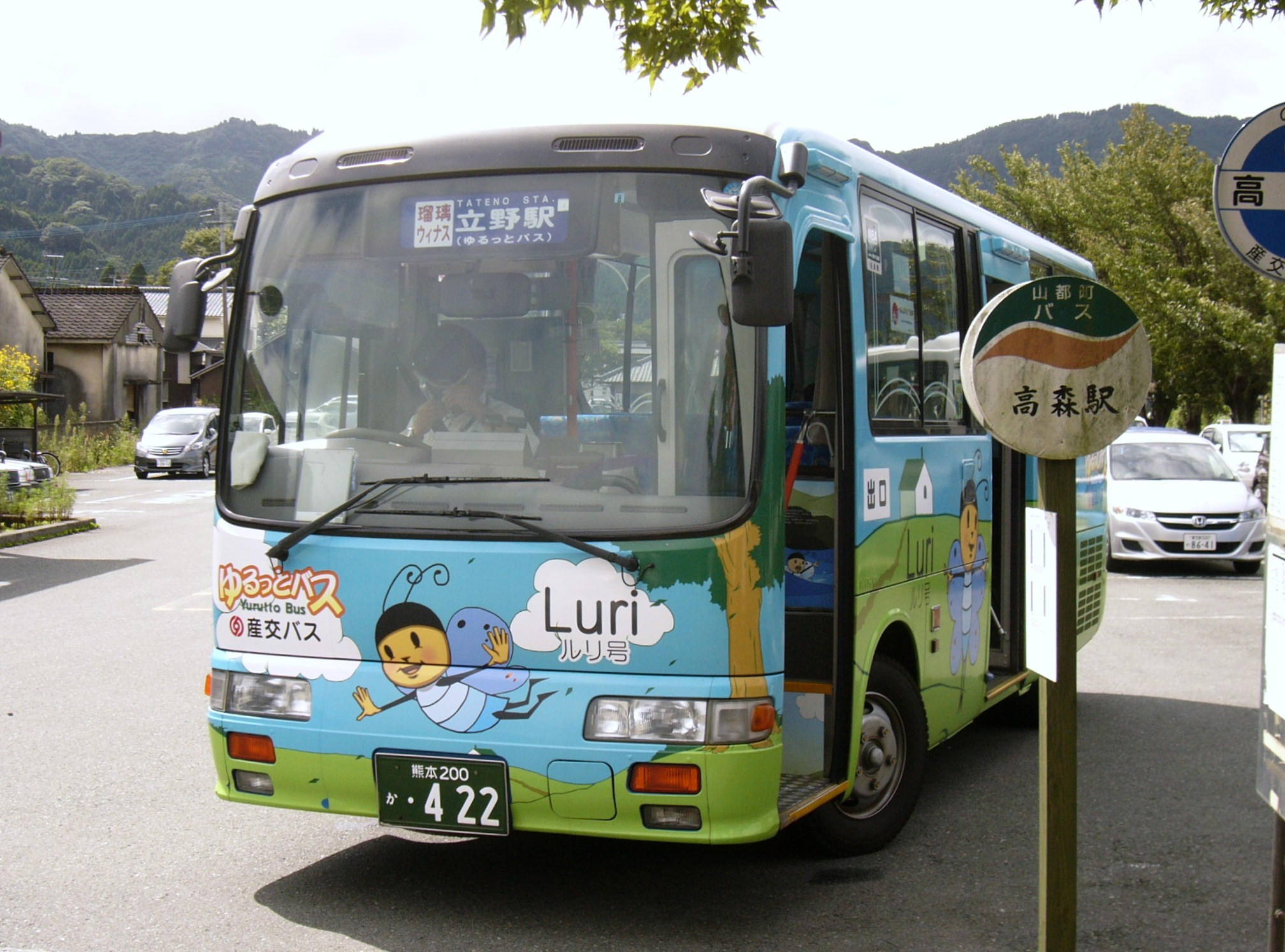 南阿蘇村ゆるっとバス 高森駅にて